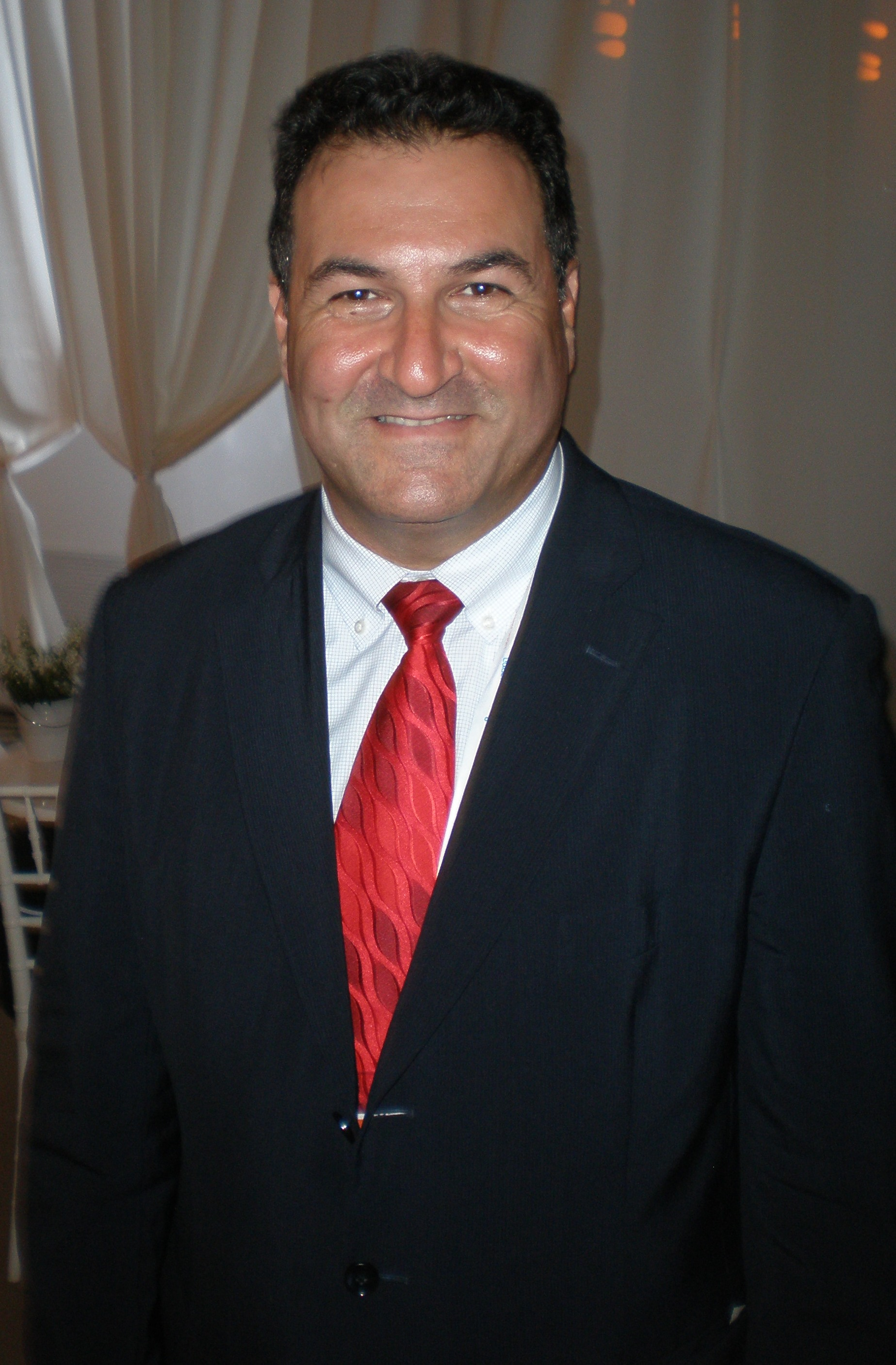 he:ישראל מימון